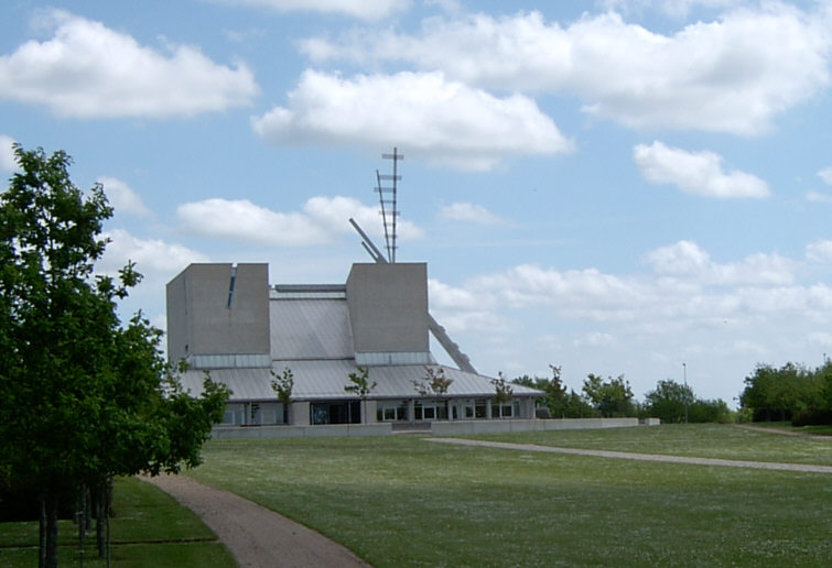 Fonnesbæk kirke i Fonnebæk Sogn, Hammerum Herred, Ringkøbing Amt. Jakobsstige udsmykker kirken